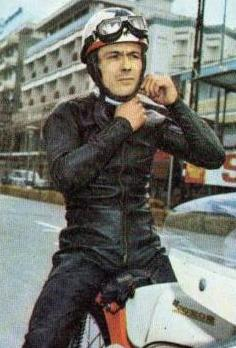 Il motociclista Gilberto Parlotti Figurine Panini Campioni dello sport 1970/71